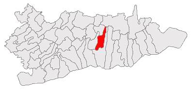 Categorie:Hărţi ale judeţului Călăraşi